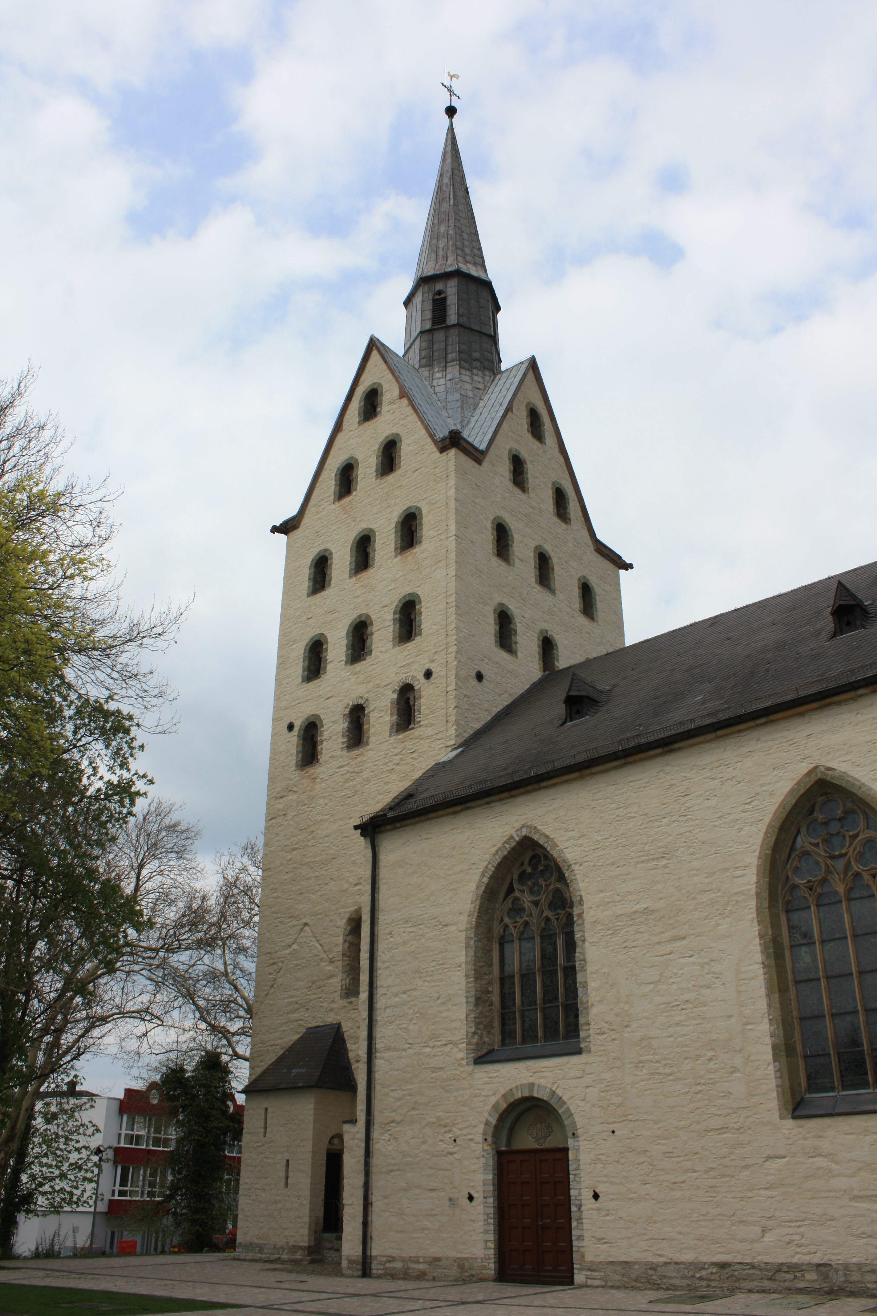 Turm von St. Cyriakus Geseke